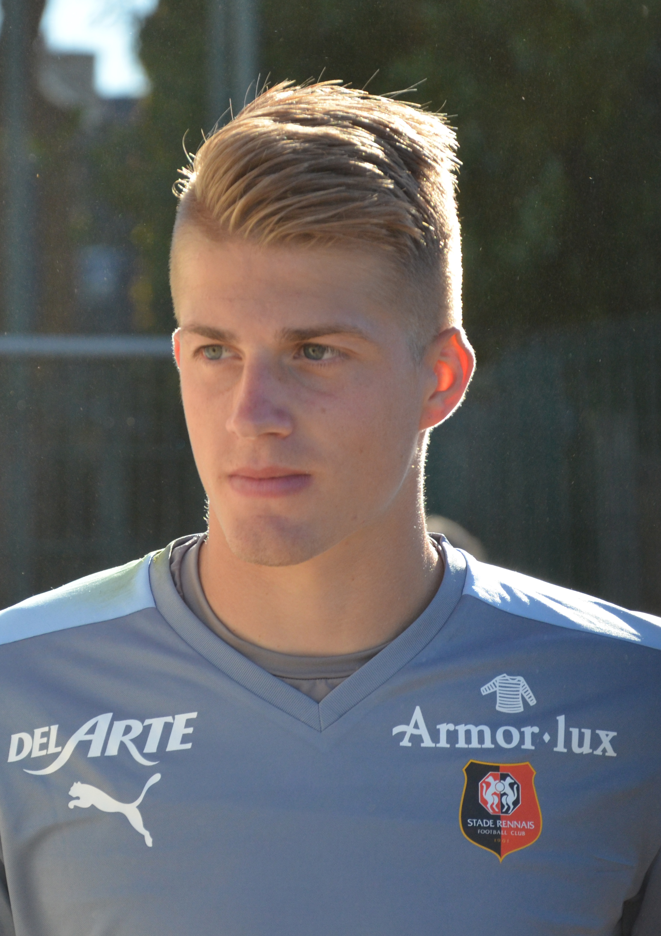 Photographie prise lors du match opposant le Stade rennais à l'USM Alger en match amical au stade Paul-Audrin de Dinard le 16 juillet 2016. Ici, Paul Nardi.